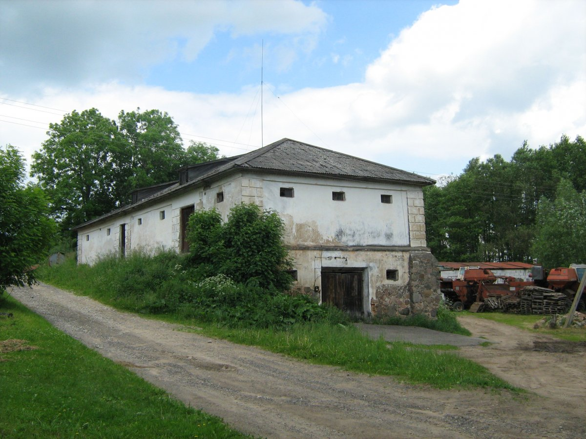 Дзякшняны. Гаспадарчыя пабудовы